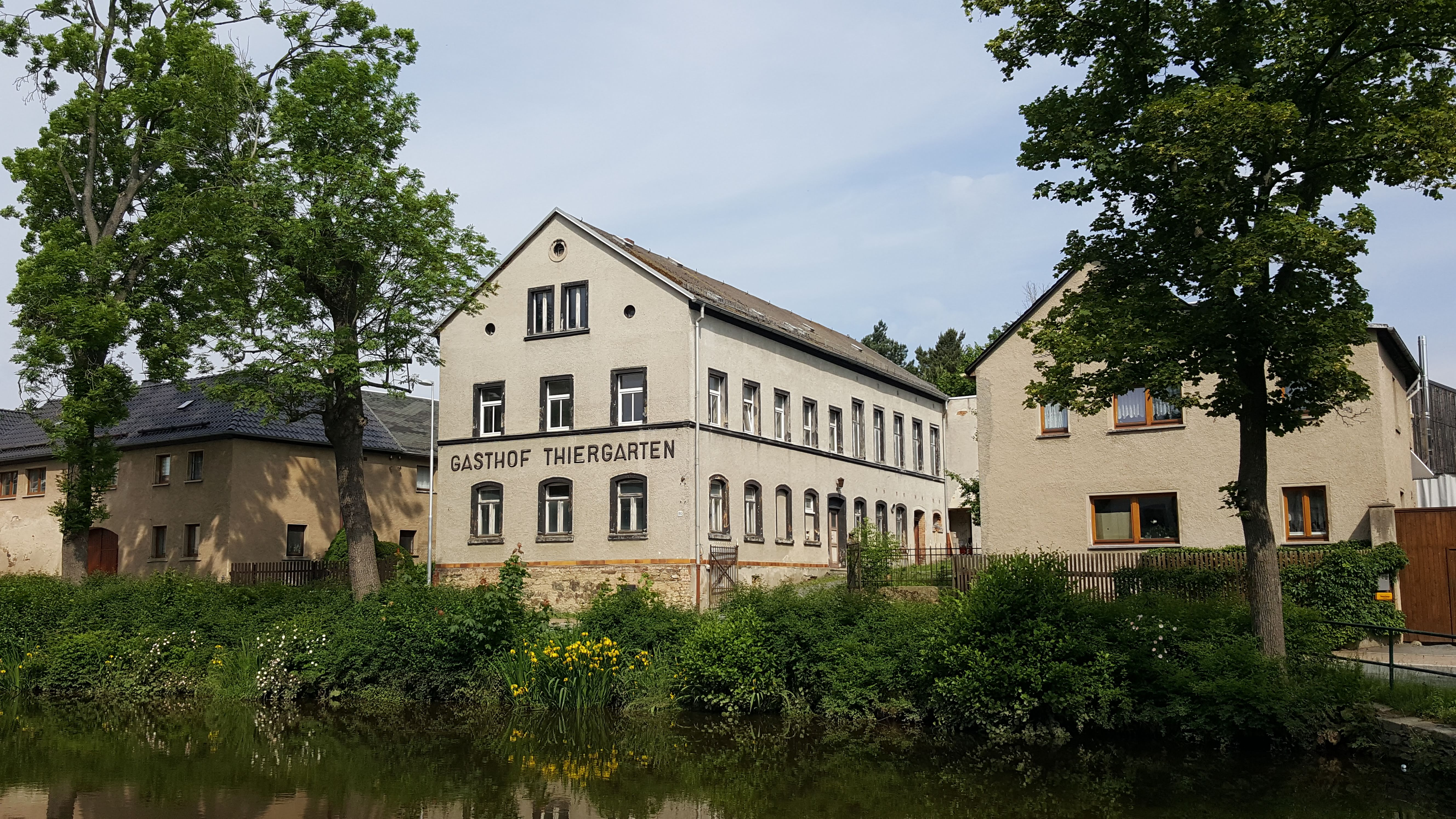 ehem. Gasthof Thiergarten (Plauen), Zum Burgteich 80